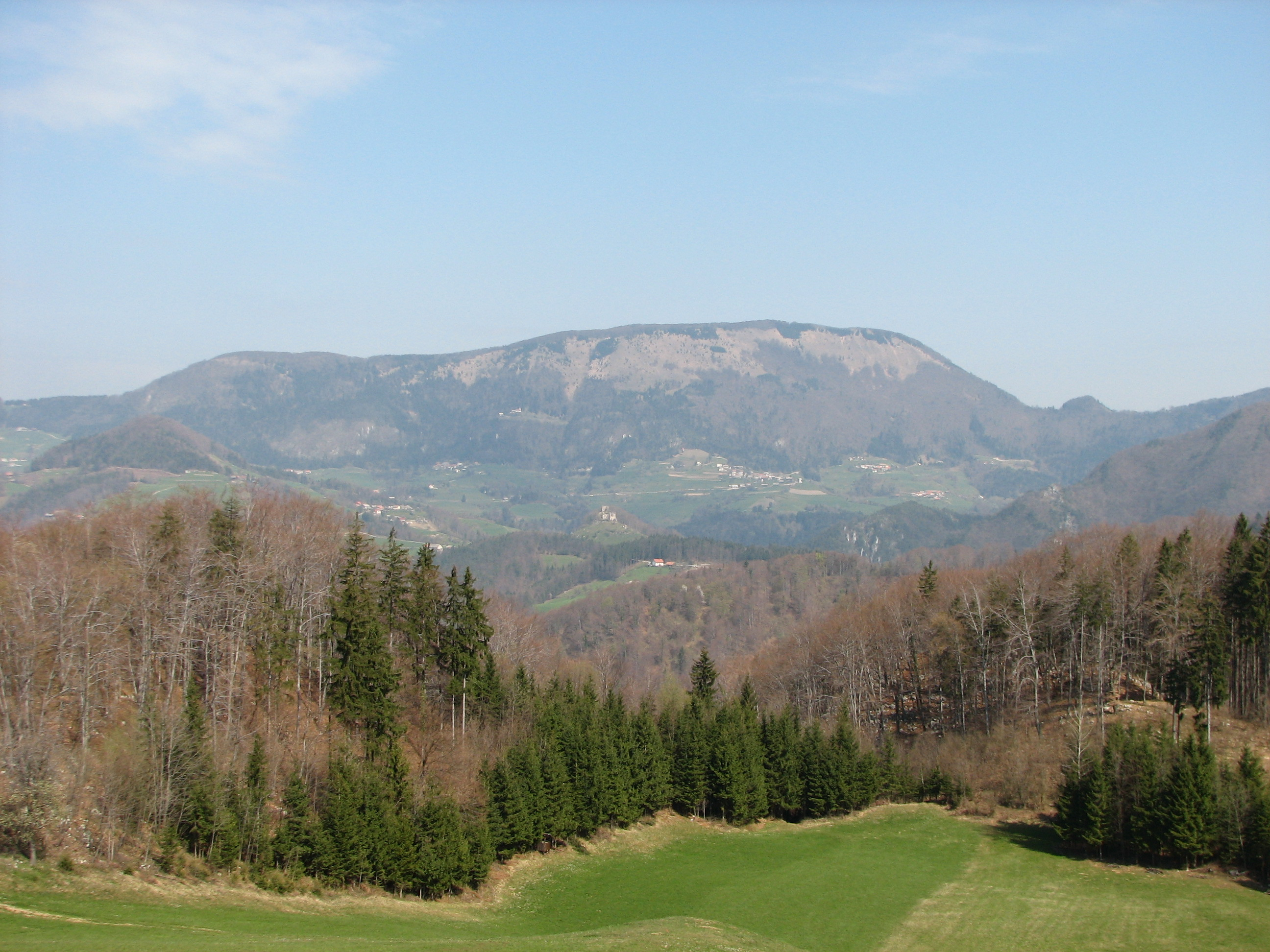 Čemšeniška planina (1204 m nadmorske višine), pogled z Vrha nad Čolniščami